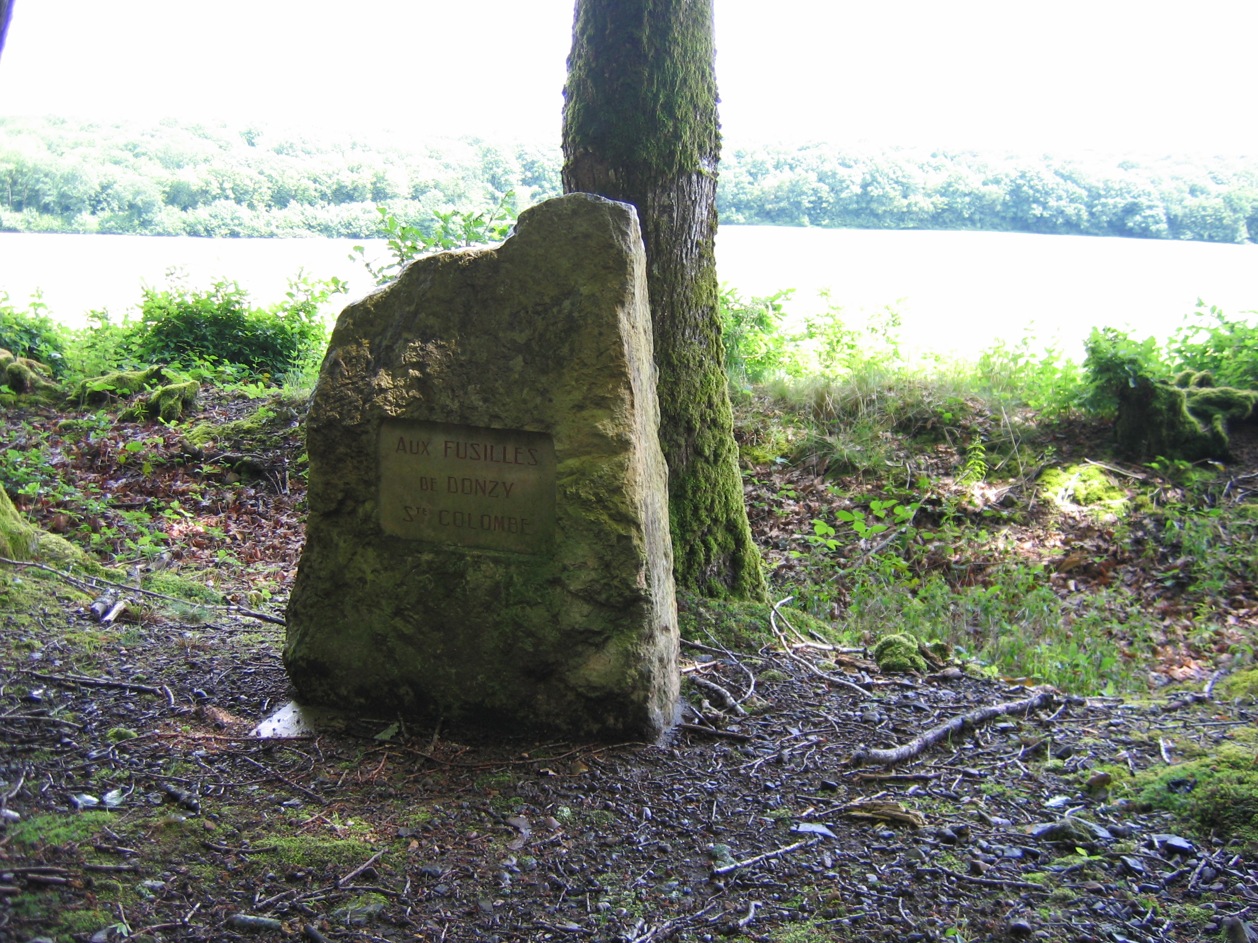 lieux ou furent retrouver les corps - Sainte Colombe des Bois